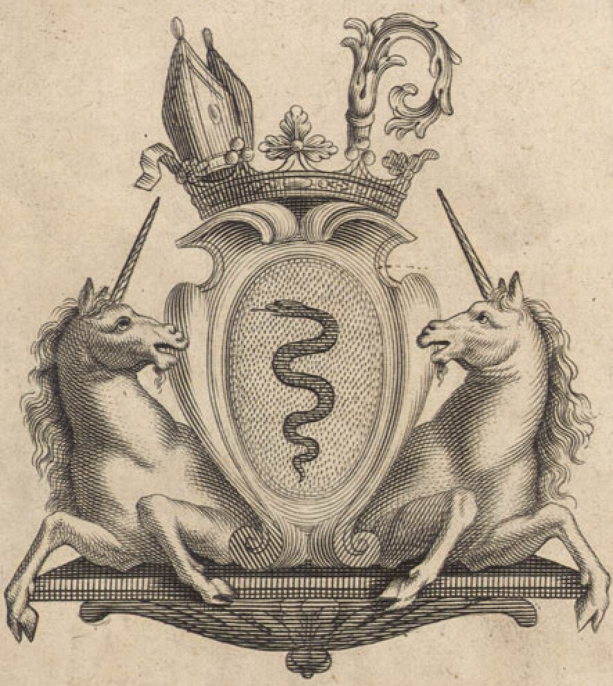 Blason de Charles-Joachim Colbert de Croissy, évêque de Montpellier